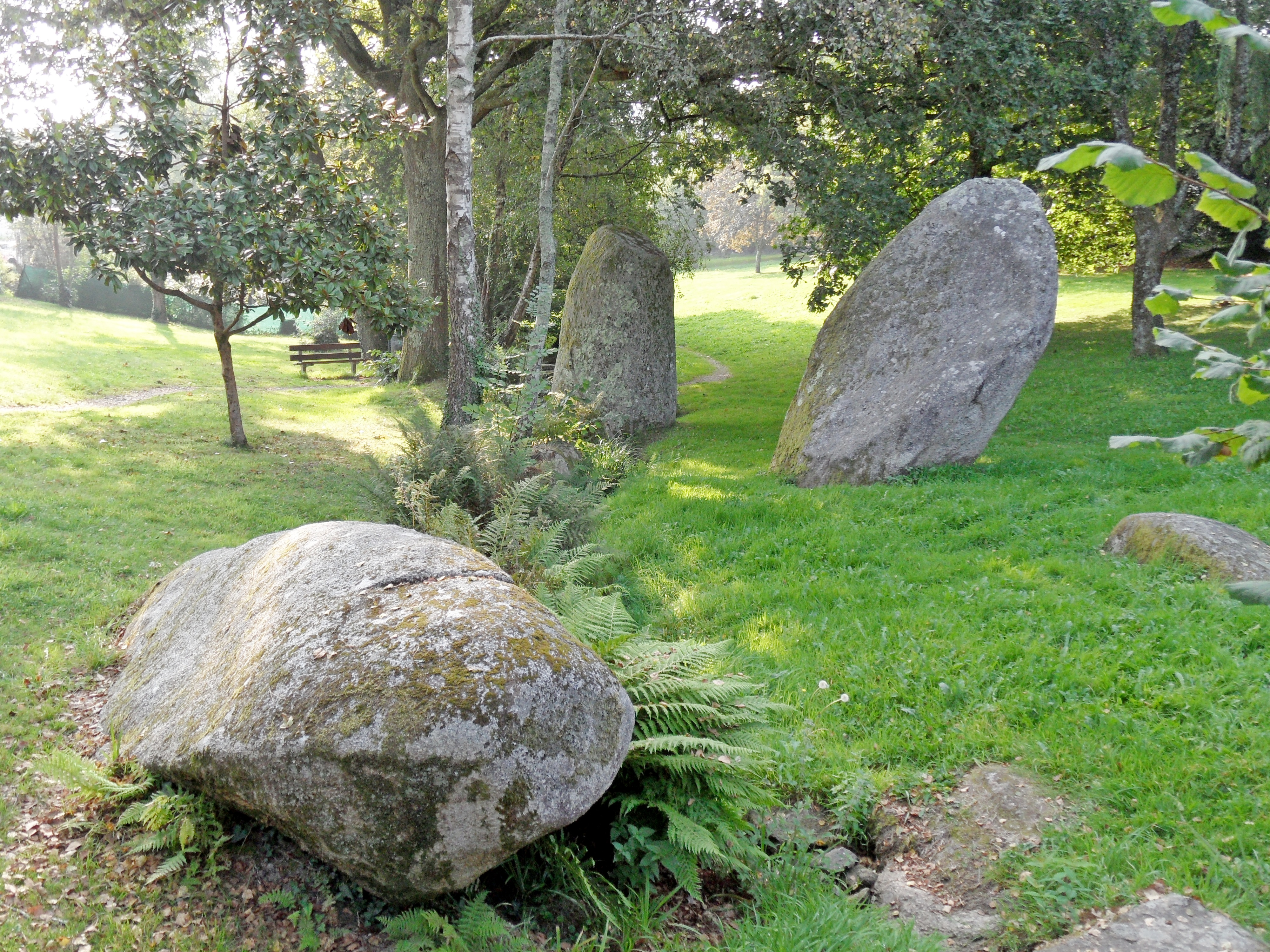 Menhirs .